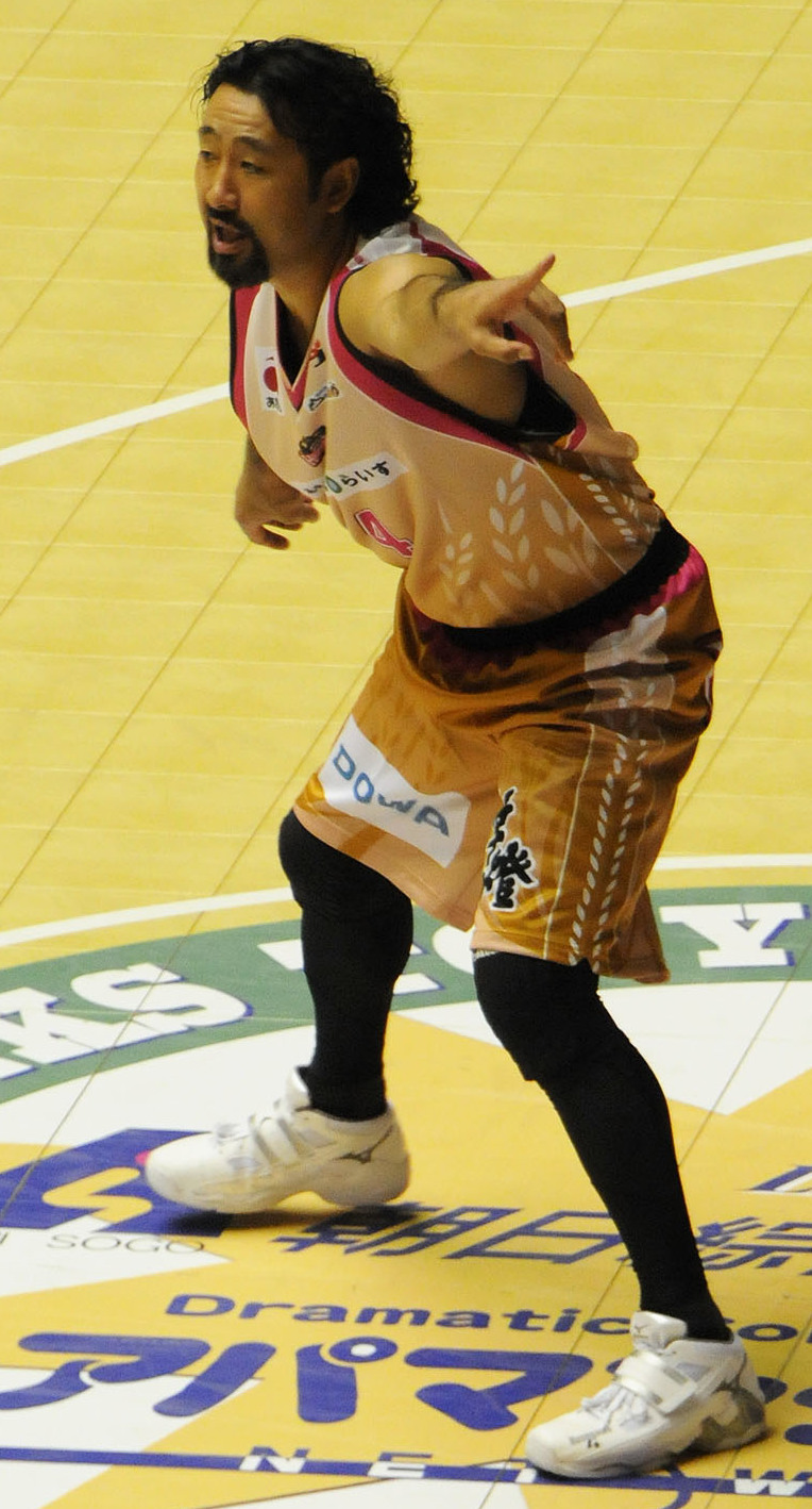 秋田ノーザンハピネッツ、長谷川誠選手。秋田県立体育館で。